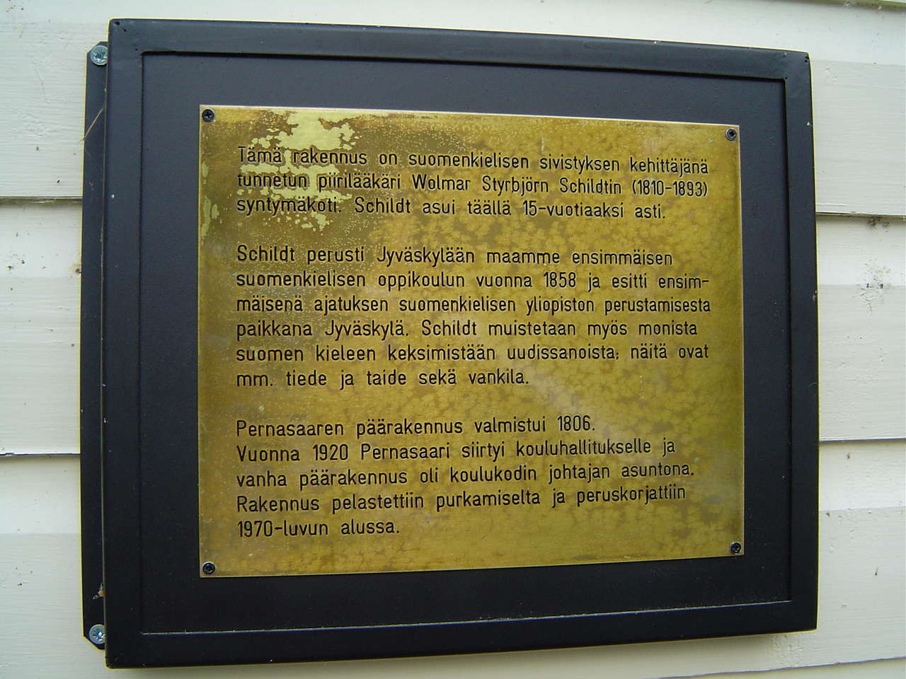 Muistolaatta Wolmar Schildtin syntymäkodin (Laukaa, Pernasaari) seinällä. Asetettu Kukan päivänä 2005, Wanhan Laukaan kotiseutuyhdistyksen, Jyväskylän yliopistomuseon ja Laukaan vankilan toimesta.